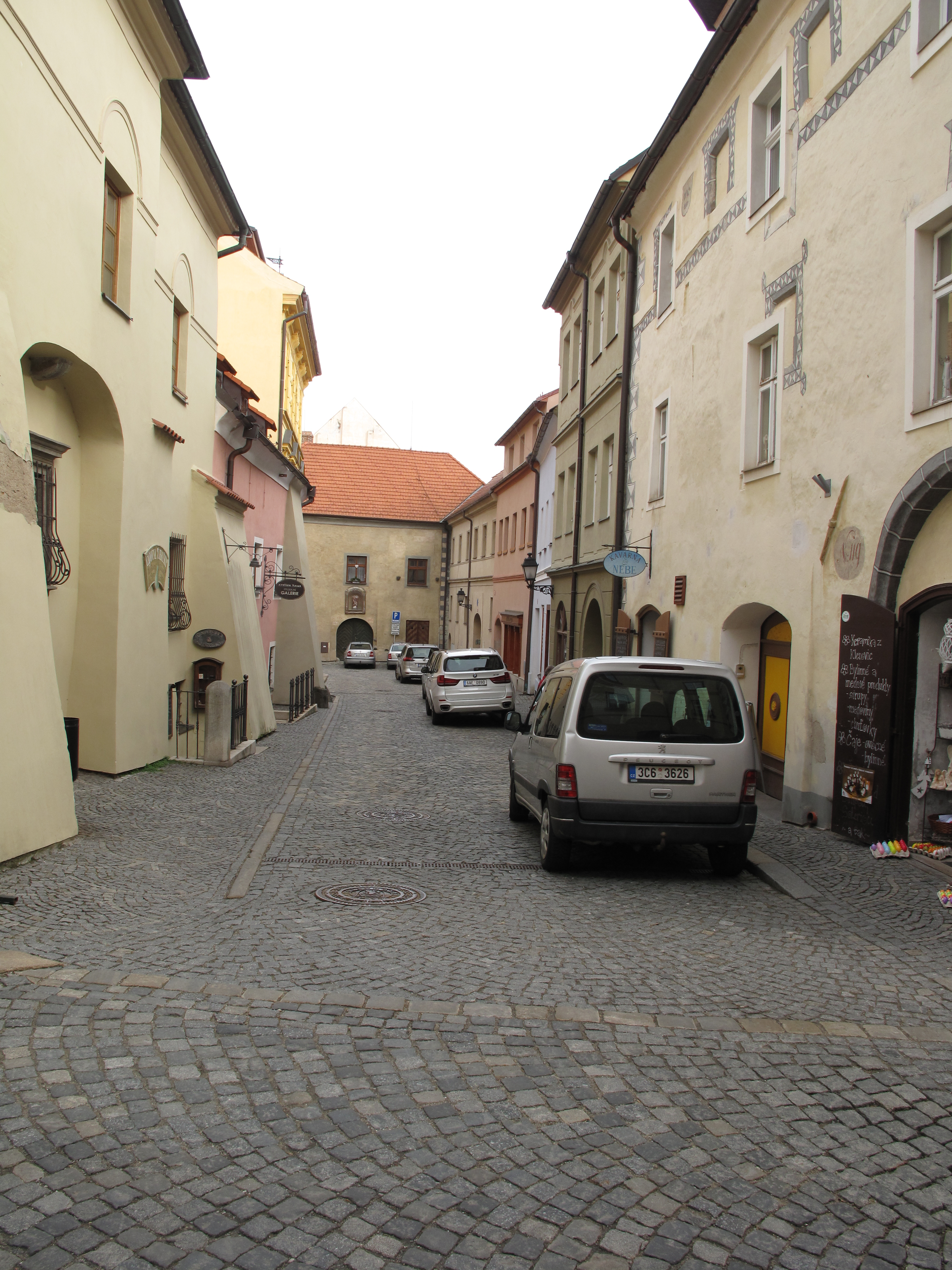 Ulice Poštovní v Prachaticích. Česká republika.